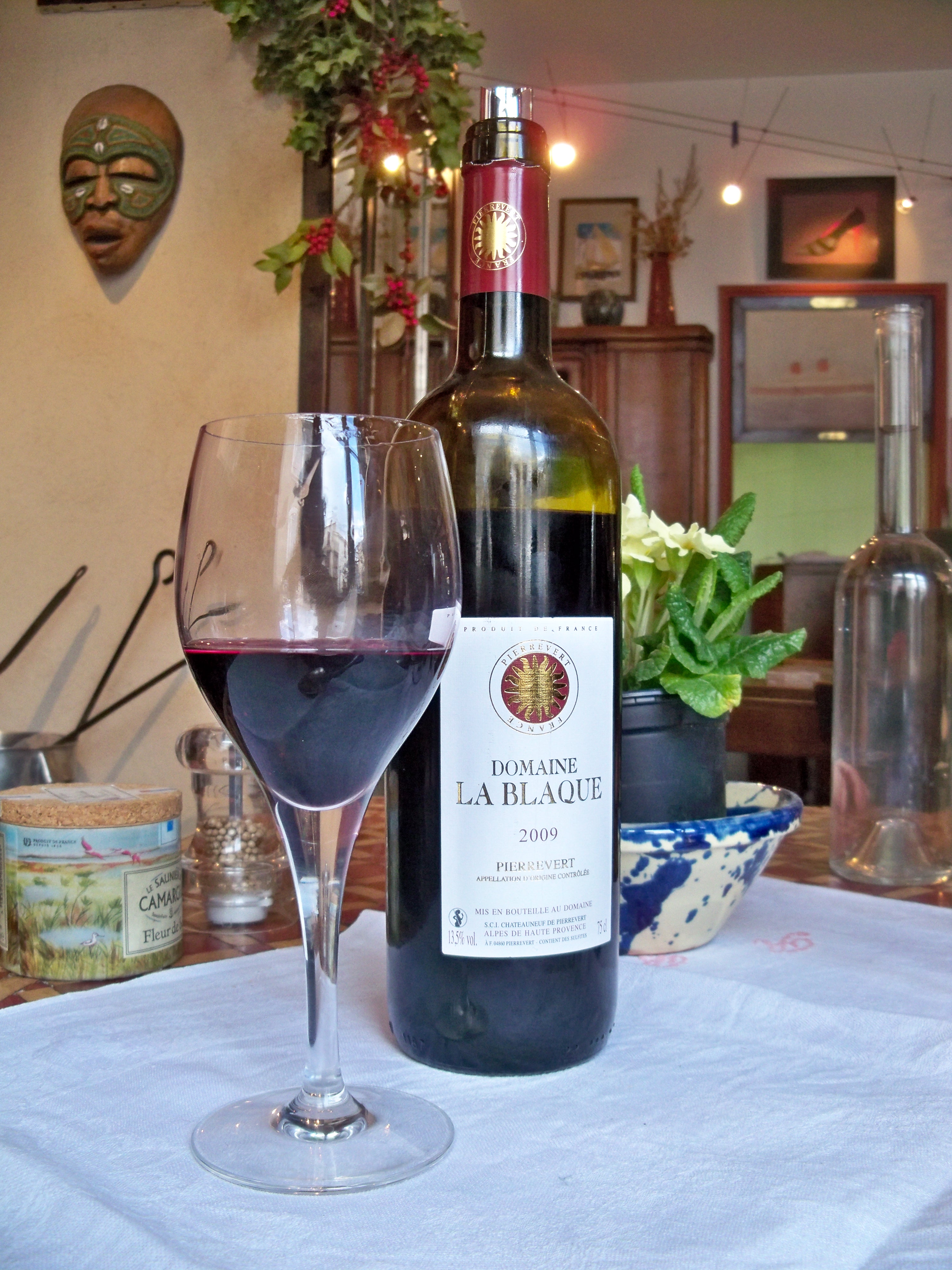 Bouteille du domaine de la Blanque, Pierrevert AOC